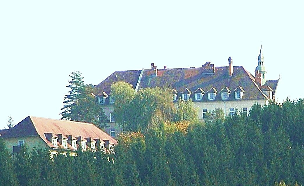 Kloster Hamberg